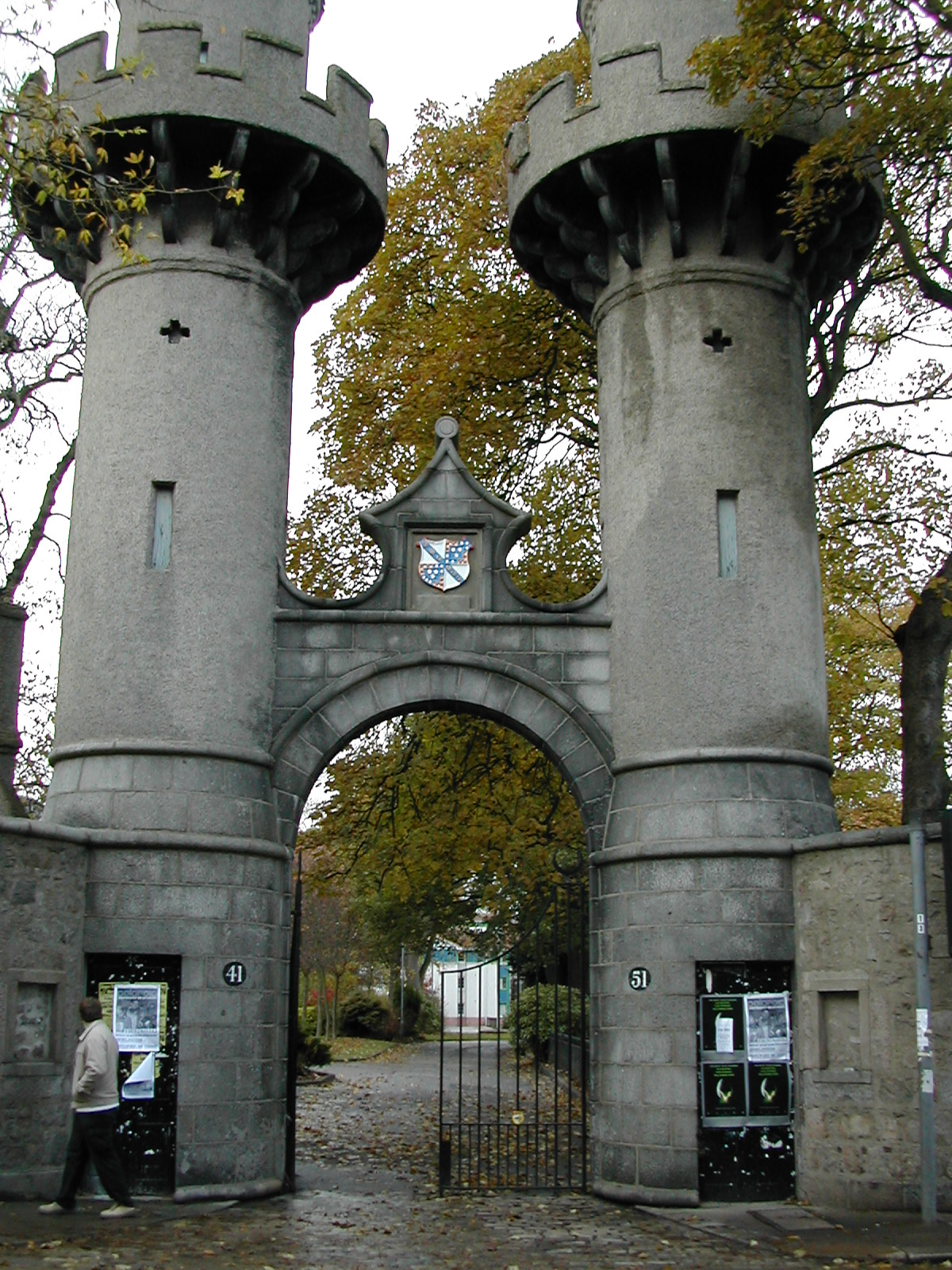 Nom du fichier : DSCN2484.JPG Taille du fichier : 623.5 Ko (638454 octets) Date : 2003/10/26 12:46:47 Taille de l'image : 1600 x 1200 pixels Résolution : 300 x 300 ppp Profondeur en bits : 8 bits/canal Attribut de protection : Désactivé Attribut Masqué : Désactivé ID de l'appareil : N/A Appareil : E775 Mode de qualité : FINE Mode de mesure : Multizones Mode d'exposition : Programme Auto Speed Light : Non Distance Focale : 5.8 mm Vitesse d'obturation : 1/197.3 seconde Ouverture : F2.8 Correction d'exposition : 0 IL Balance des blancs : Auto Objectif : Intégré Mode Synchro-Flash : Premier Rideau Différence d'exposition : N/A Programme Décalable : N/A Sensibilité : Auto Renforcement de la netteté : Auto Type d'image : Couleur Mode Couleur : N/A Saturation : N/A Contrôle Saturation : N/A Compensation des tons : Normal Latitude (GPS) : N/A Longitude (GPS) : N/A Altitude (GPS) : N/A